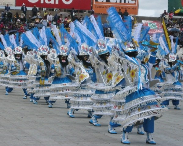 MORENADA PUNO PERU